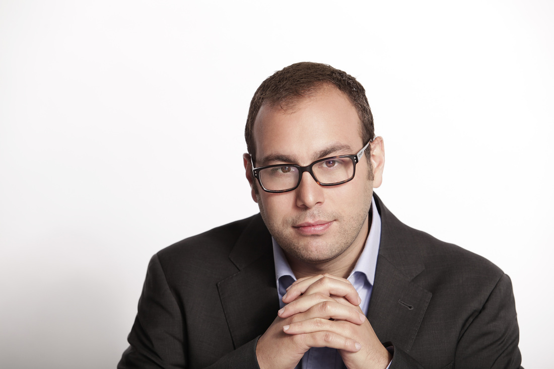 Tomás Ocaña Urwitz